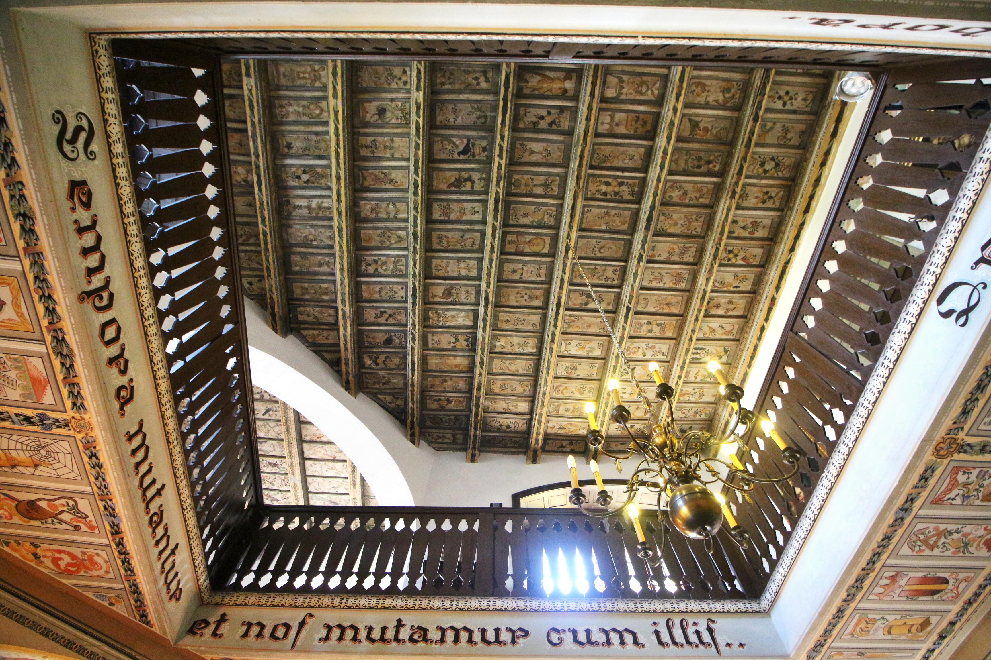 Interiéry zámku v Radimi